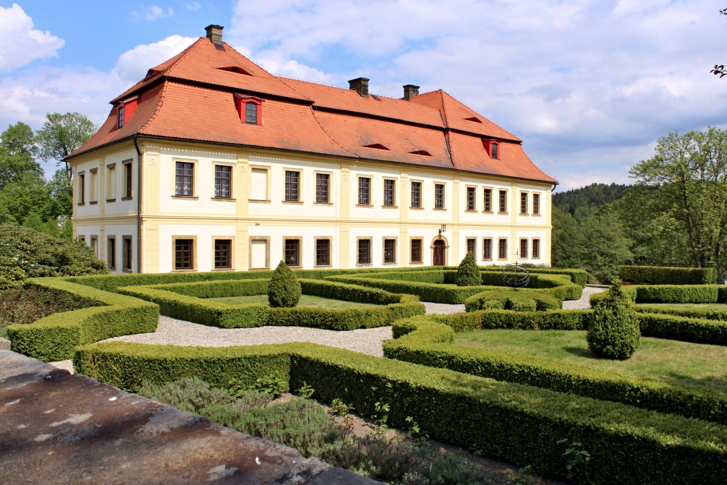 Palmeho dvůr v Jablonném-Markvarticích